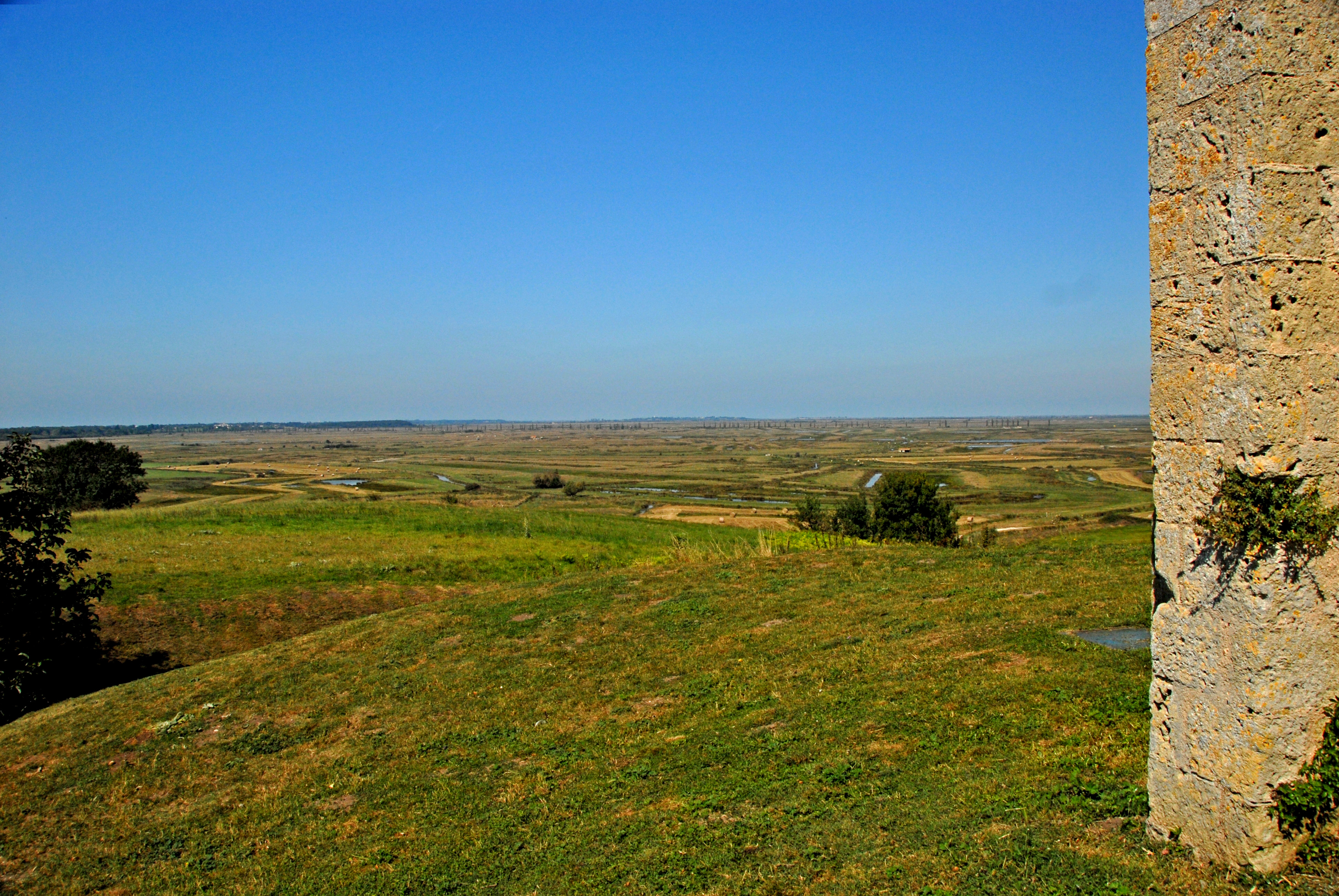 Tour-de-Broe, Vom Puy über die Sümpfe